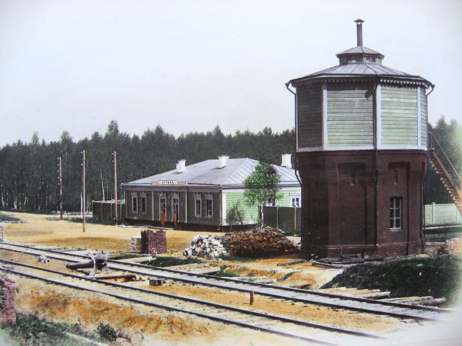 Полустанция (полустанок) "Бутово". Раскрашенное фото. 1885 год.